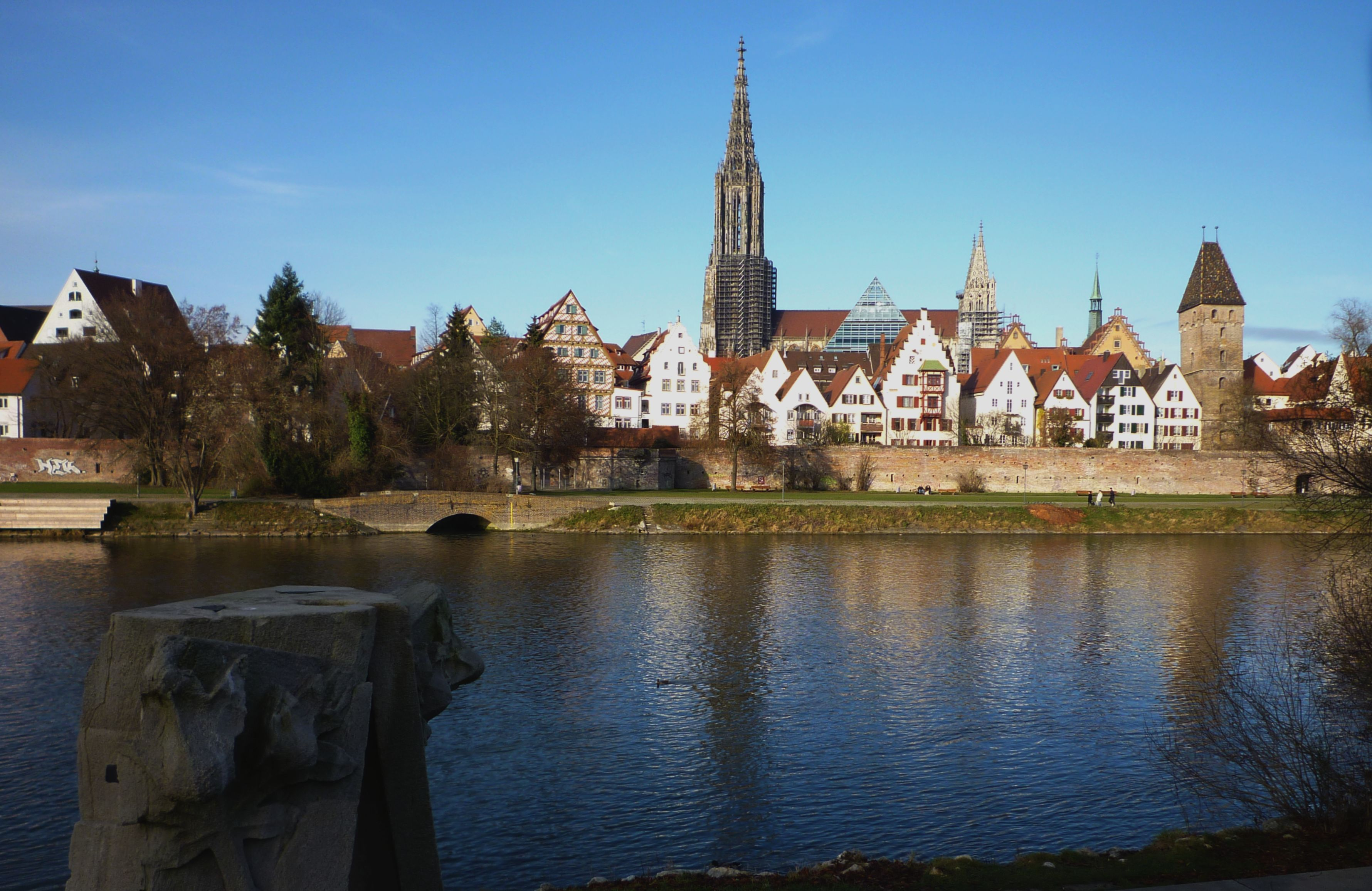 Ulm - Stadtkulisse Ulm mit Donau